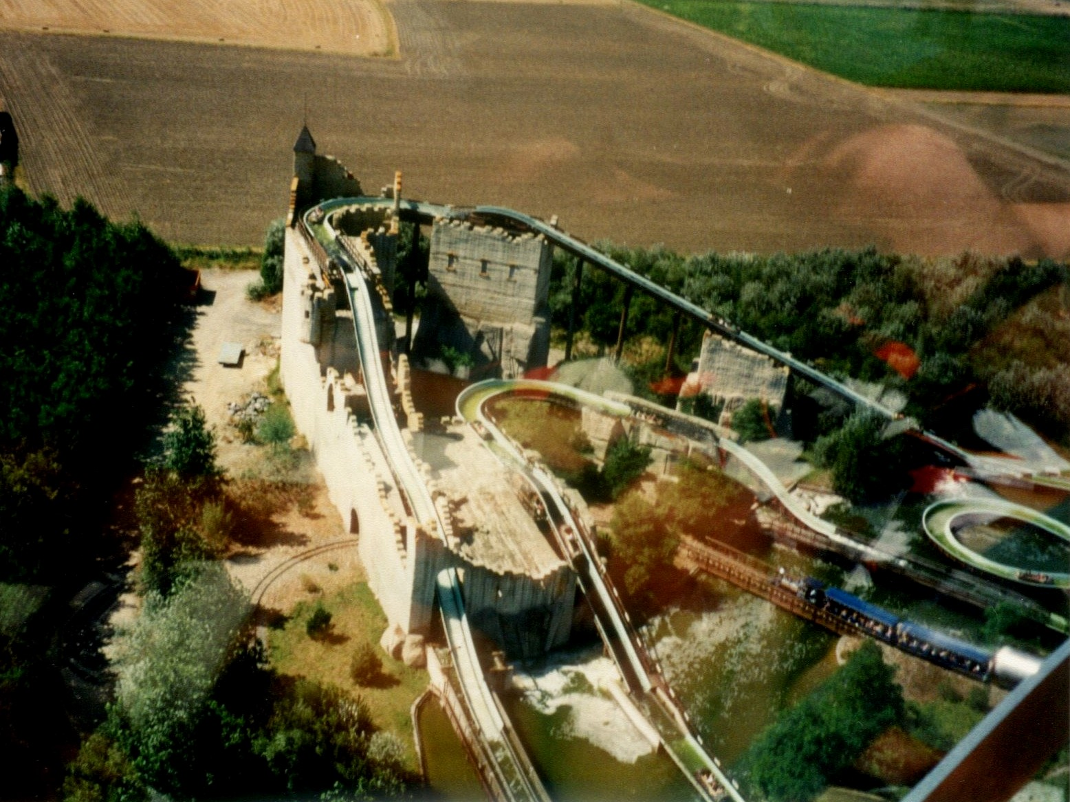 MeliparkSplash